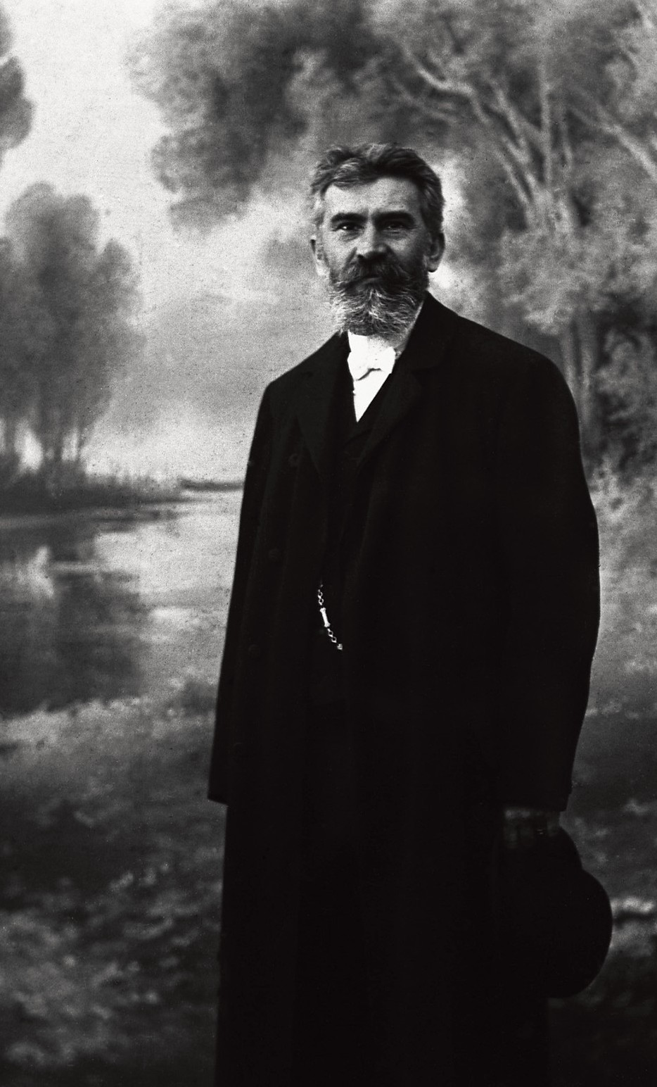 František Tyttl (1857 - 1943), Český mykolog, pedagog a přírodovědný ilustrátor.